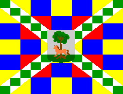 Zaldibarko bandera, Bizkaian